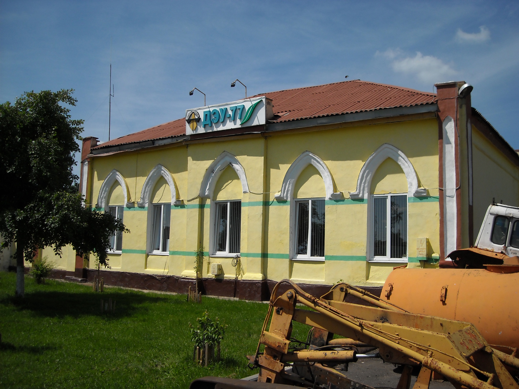 Беларуская (тарашкевіца): Будынак былой паштовай станцыі. г. Крычаў This is a photo of Belarusian heritage monument. Reference number: 513Г000480 ( WLM)